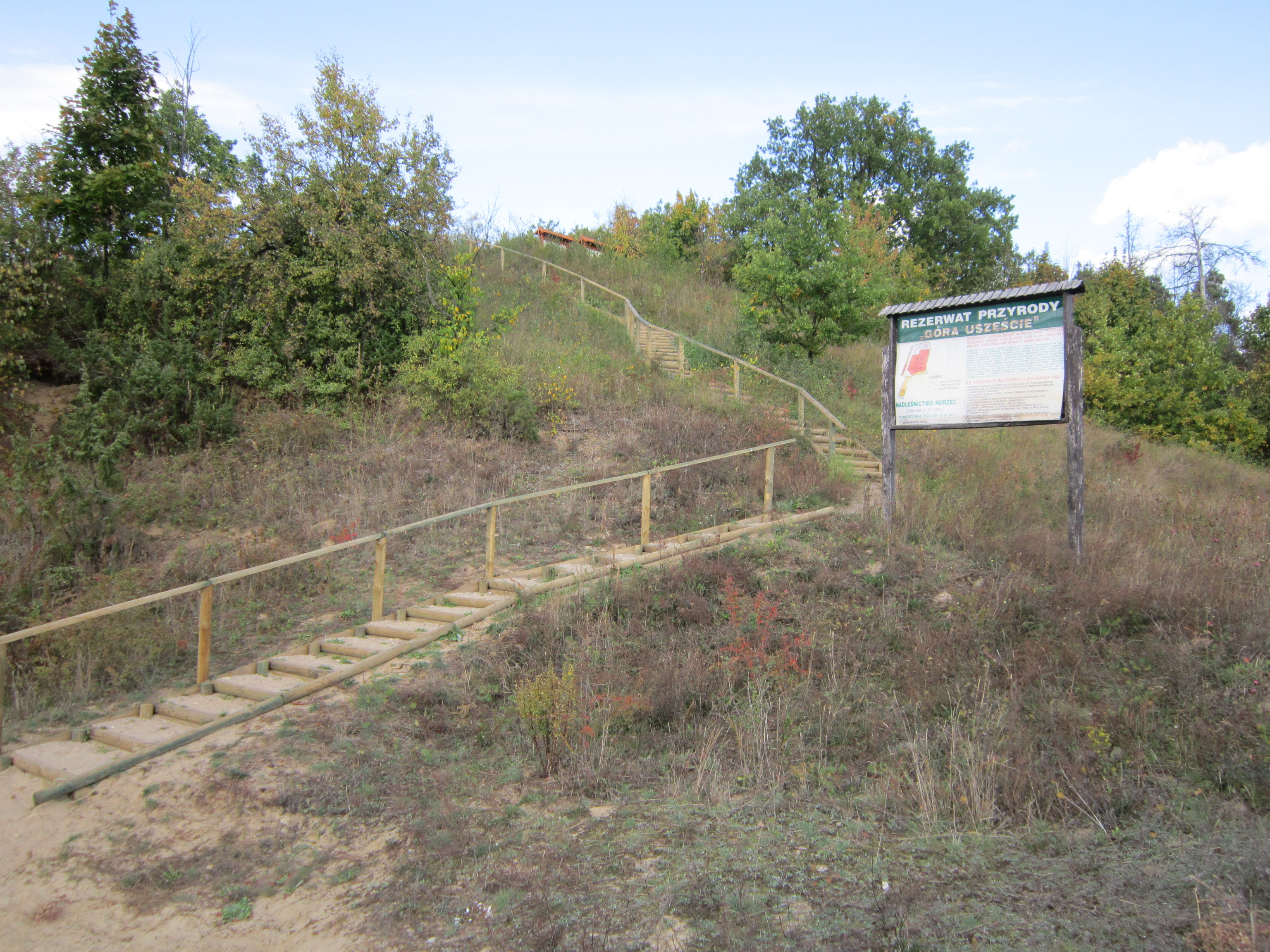 schody prowadzące na szczyt Góry Uszeście